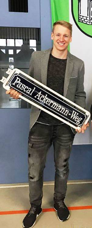 Pascal Ackermann, deutscher Radrennfahrer. In seinem Heimatort Minfeld wurde ein Weg nach ihm benannt